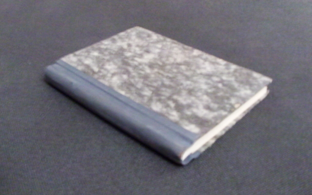 springback binder